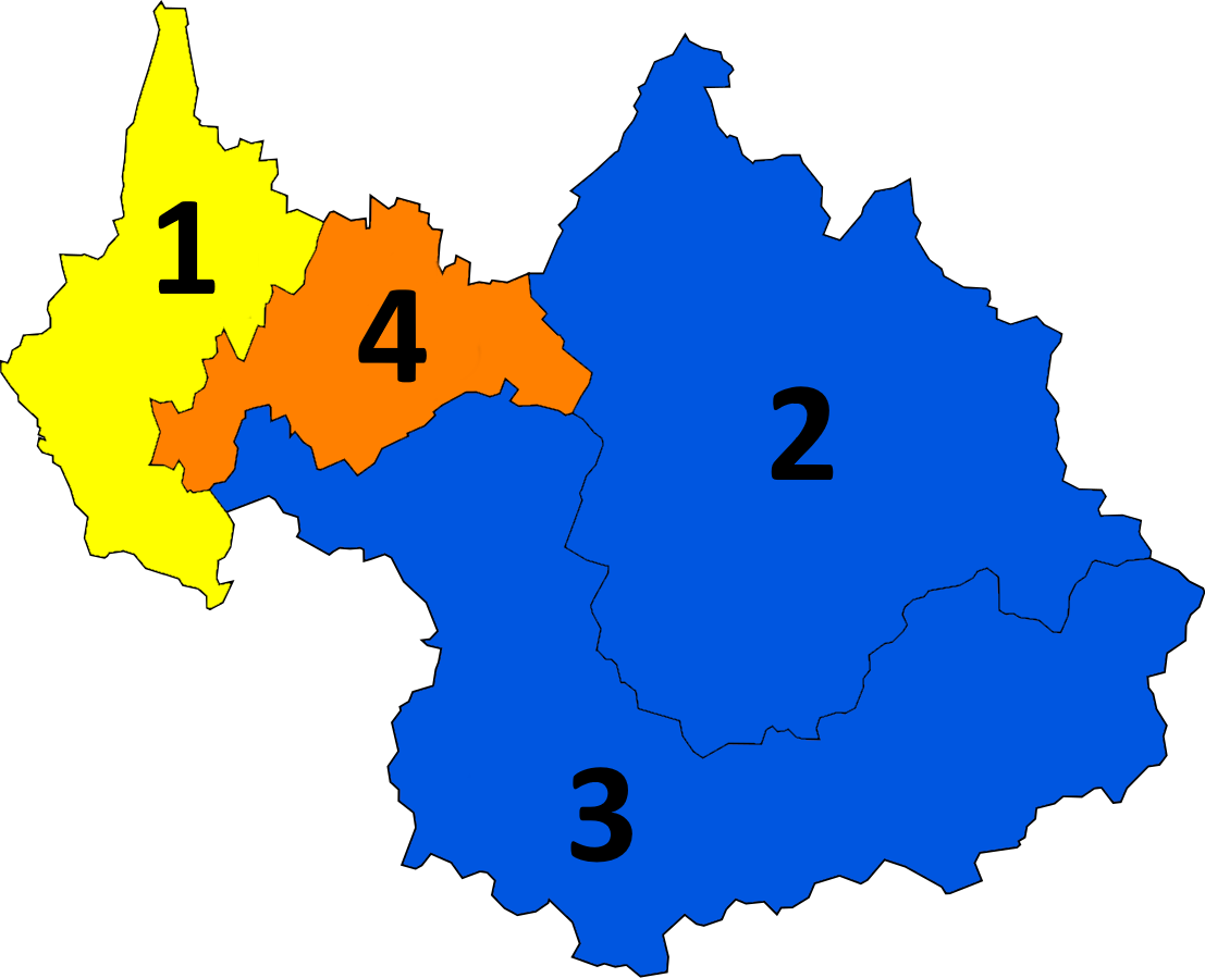 Résultats des élections législatives de Savoie en 2017.